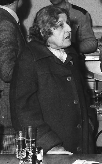 Aimée Lallement, militante associative, féministe et libre penseuse en 1980.